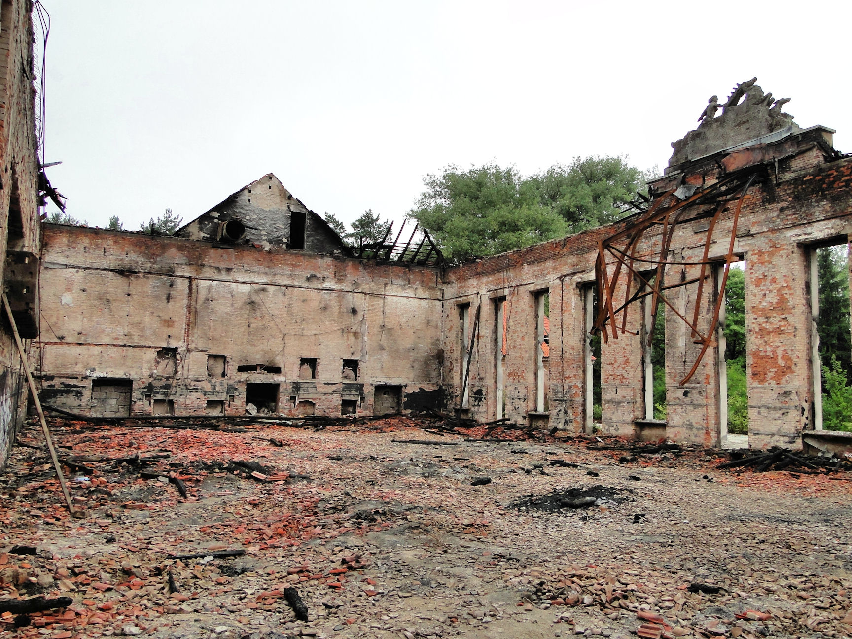 Borne Sulinowo